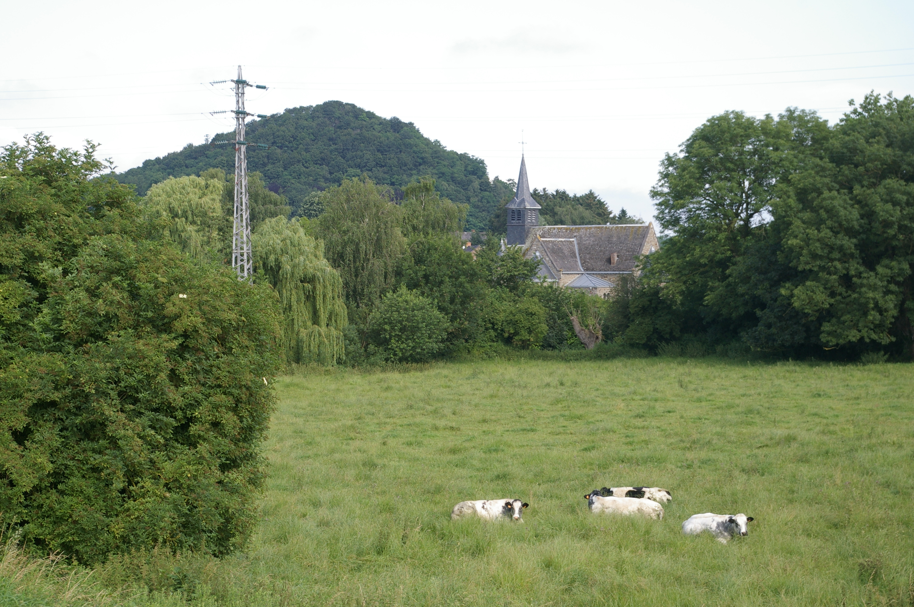 Le village de Noirchain, église Sainte Aldegonde et terril